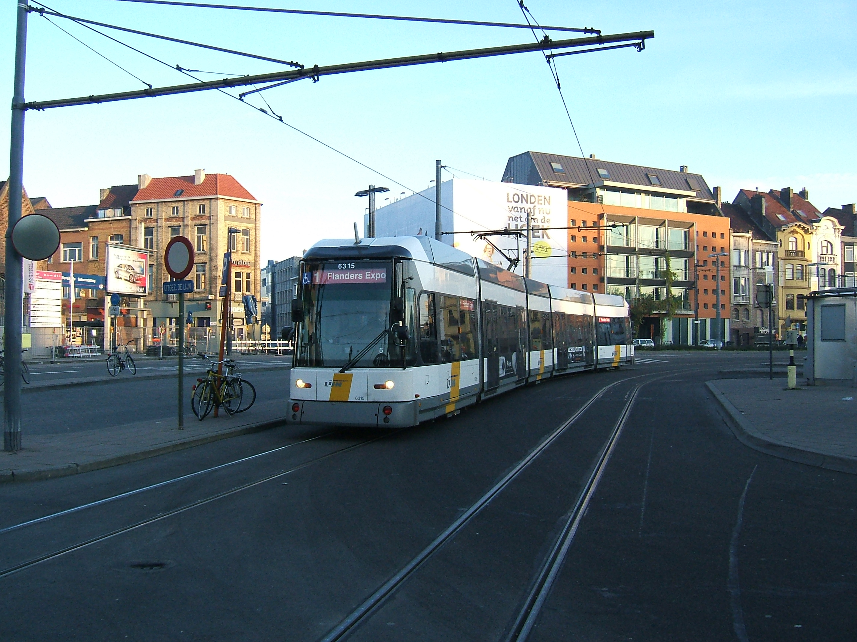 Tram in Ghent